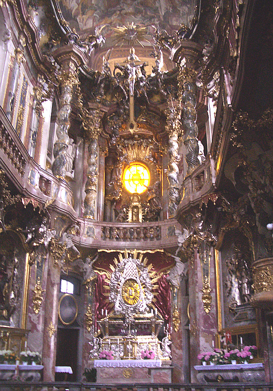 München, Germany: Asamkirche